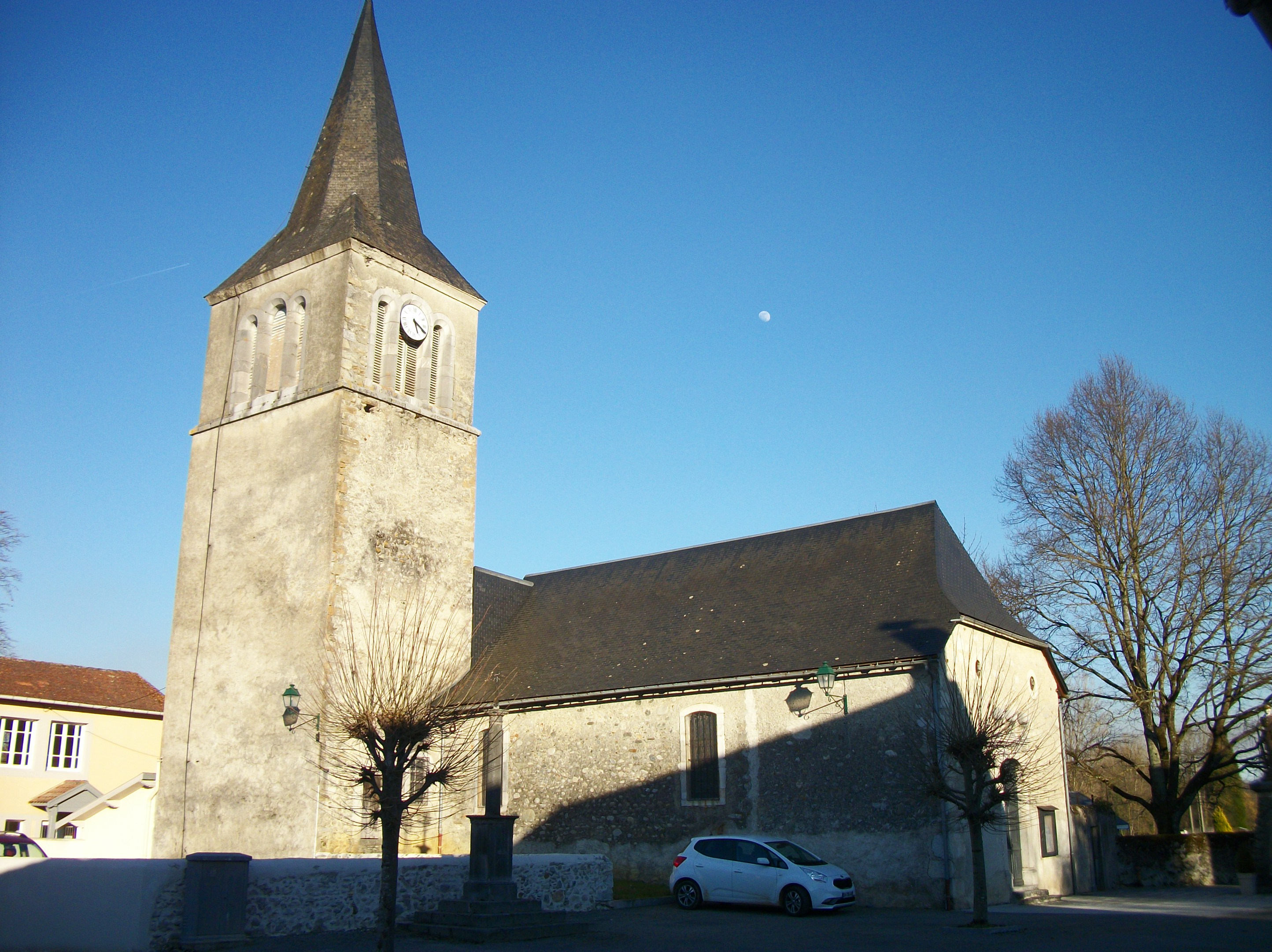 Église de l'Invention-de-Saint-Étienne